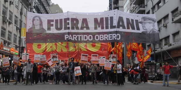 Bandera por la destitución de César Milani del Ejército Argentino por su participación en el Proceso de Reorganización Nacional.